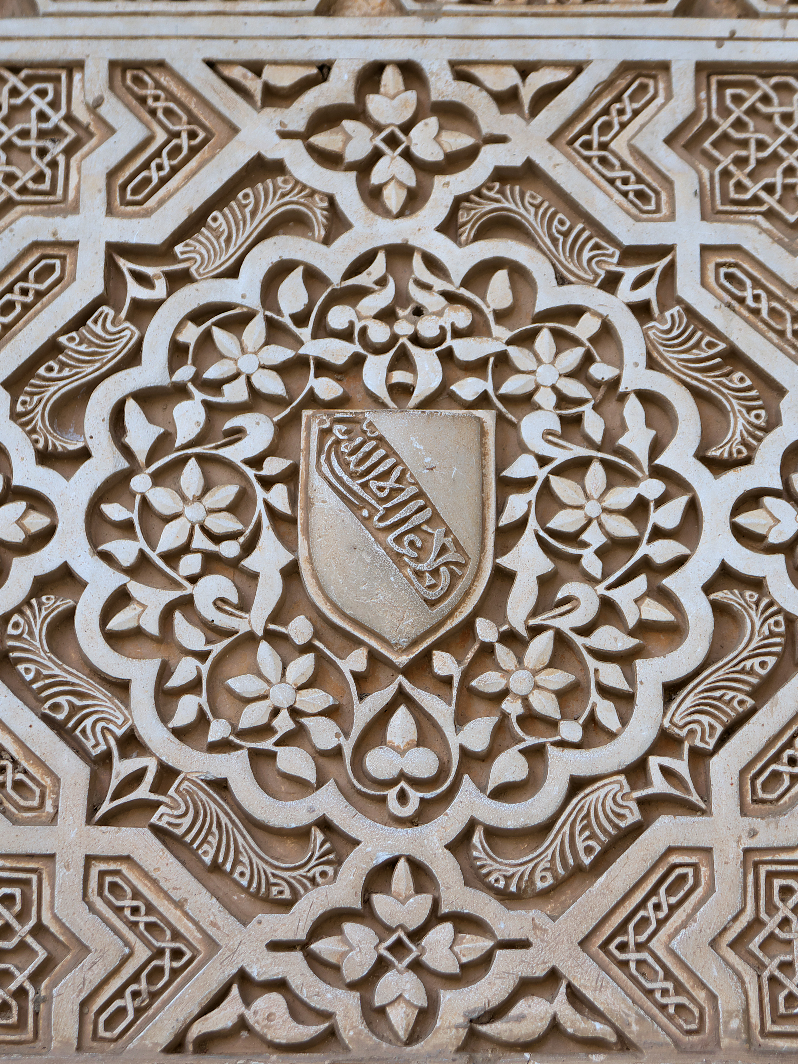 Alhambra. Escudo de sultán Muhammed V de Granada, una adaptación del escudo de la Orden de la Banda con la divisa Wa lā gāliba illā-llāh.